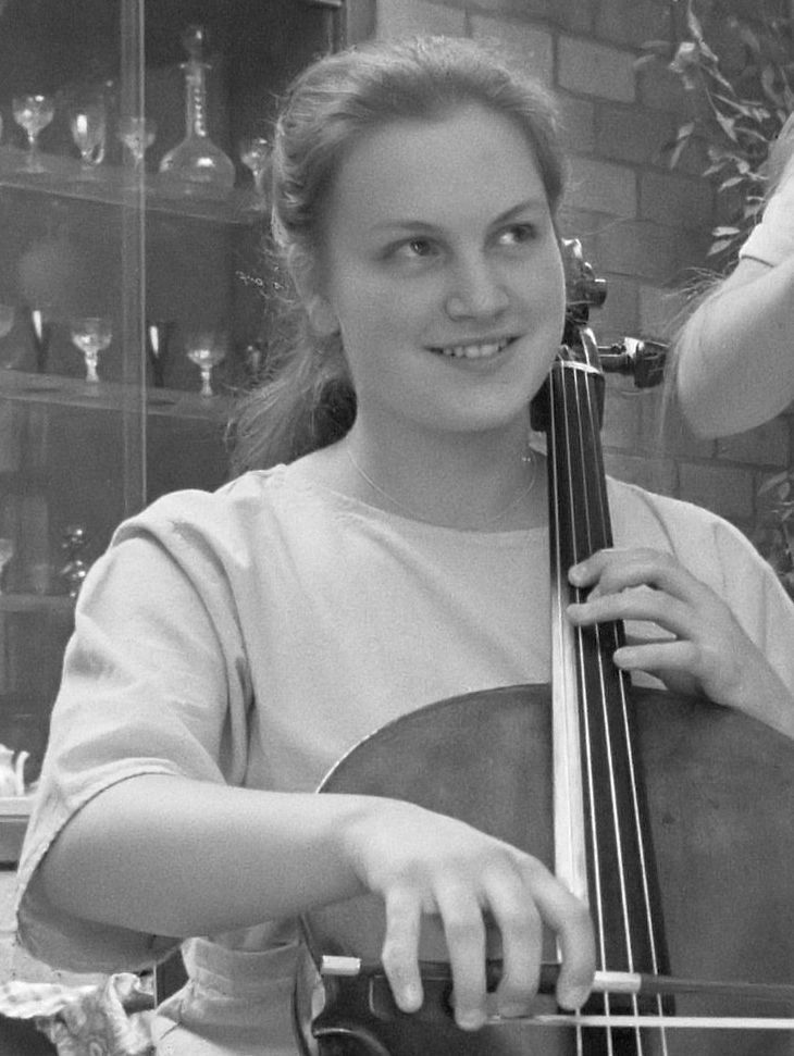 Quirine Viersen am 26. Mai 1988.